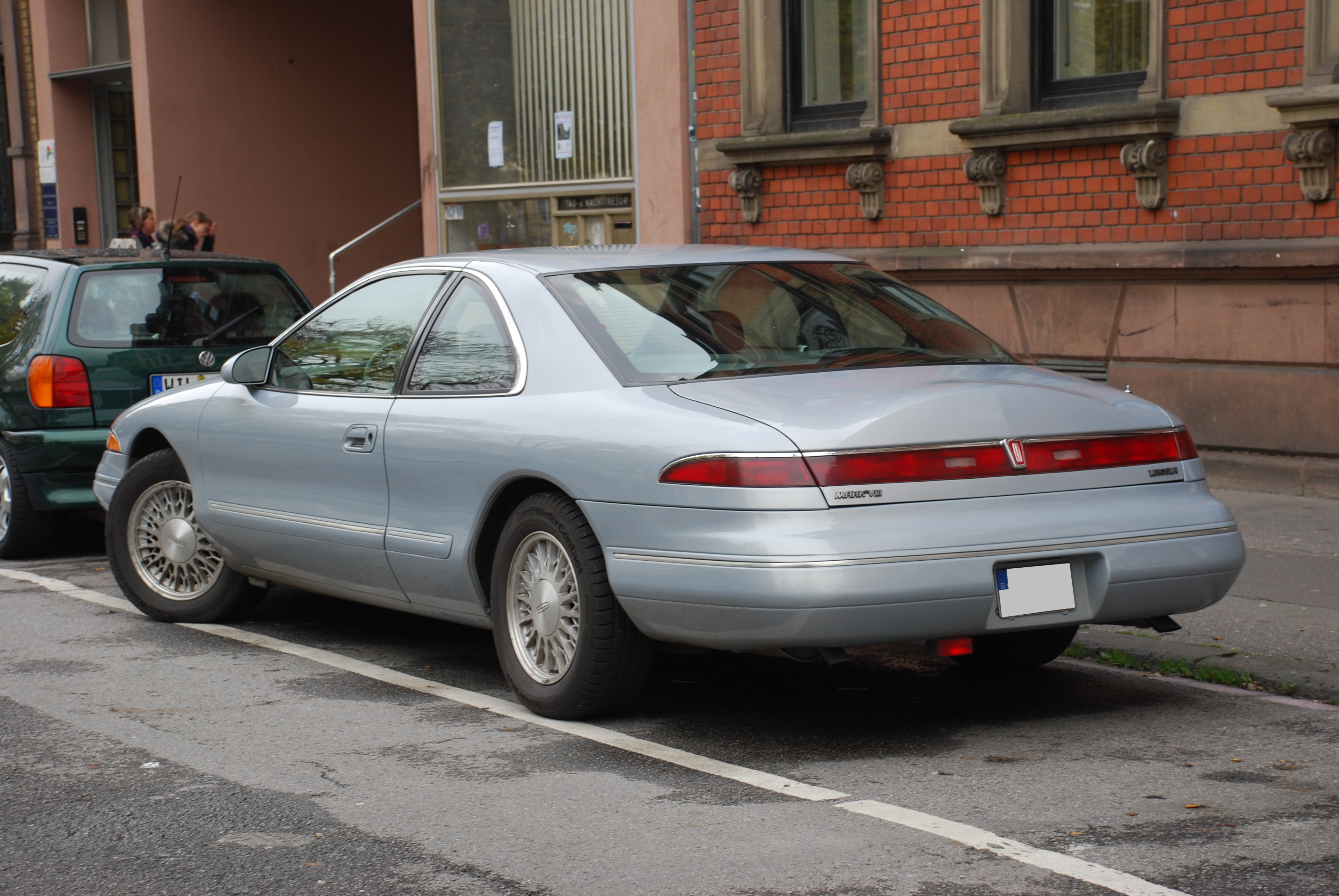 Lincoln Continental Mark VIII